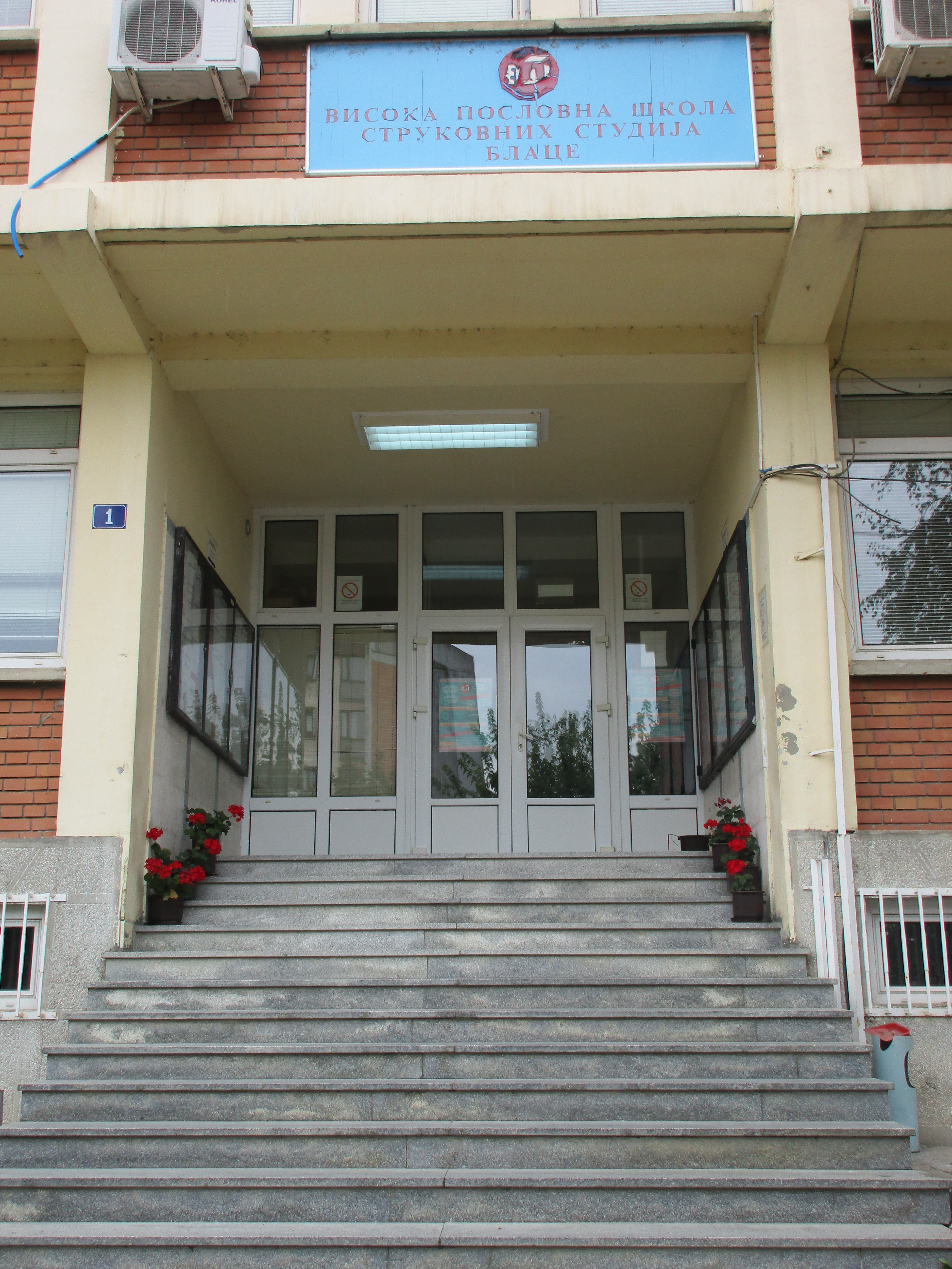 Srpski (latinica): Visoka poslovna škola strukovnih studija Blace